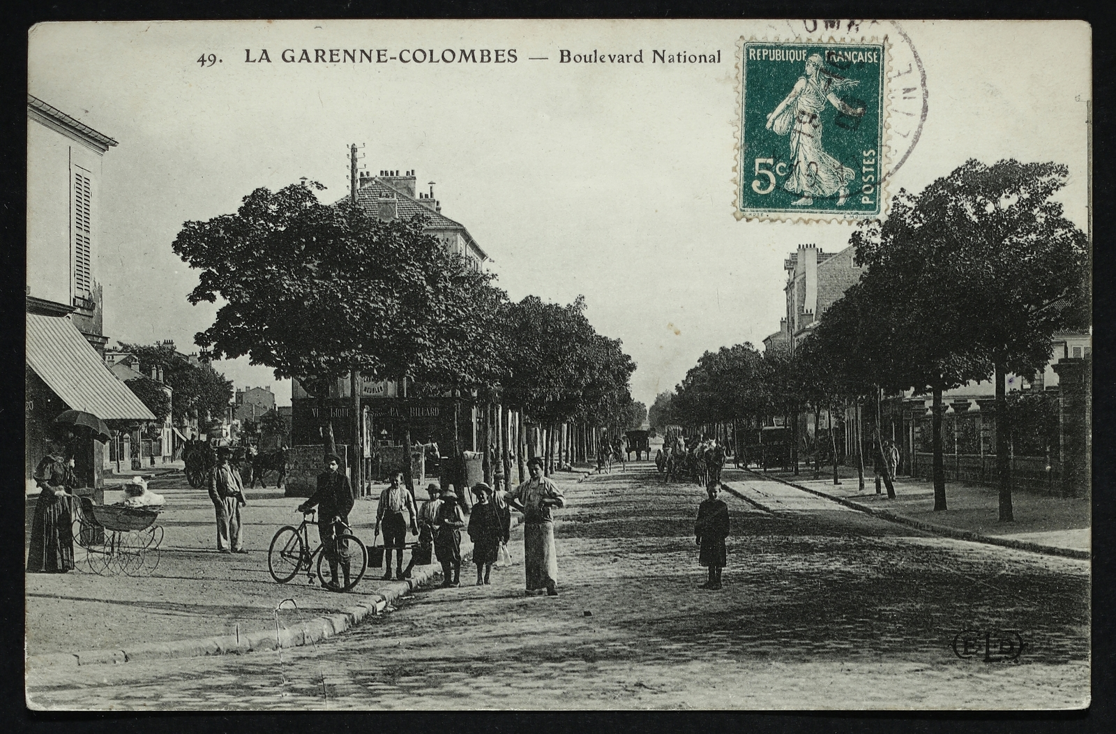 La Garenne-Colombes.Boulevard National.Badauds